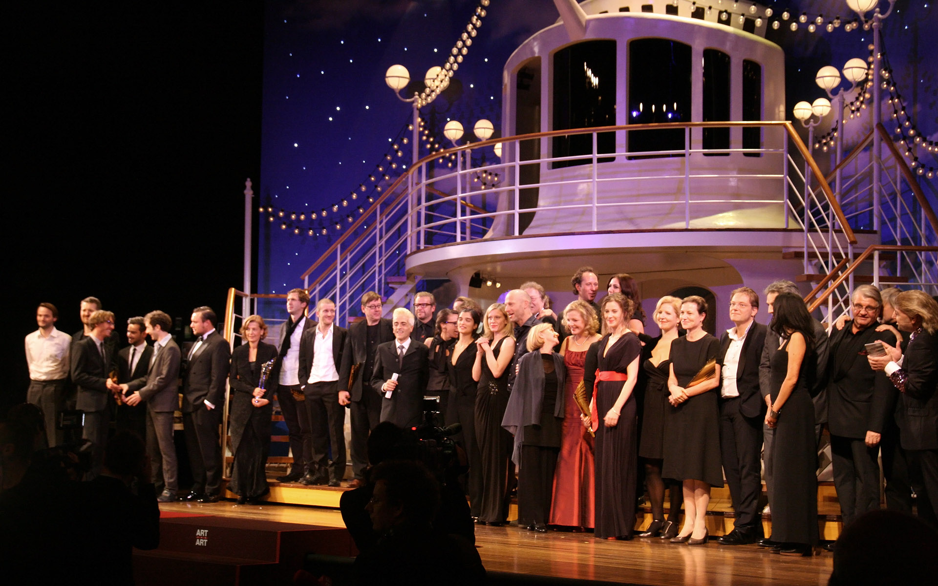 Die Preisträger und Nominierten bei der Verleihung des Nestroy-Theaterpreises 2011 im Raimund Theater in Wien; Kulisse des Musicals Ich war noch niemals in New York.